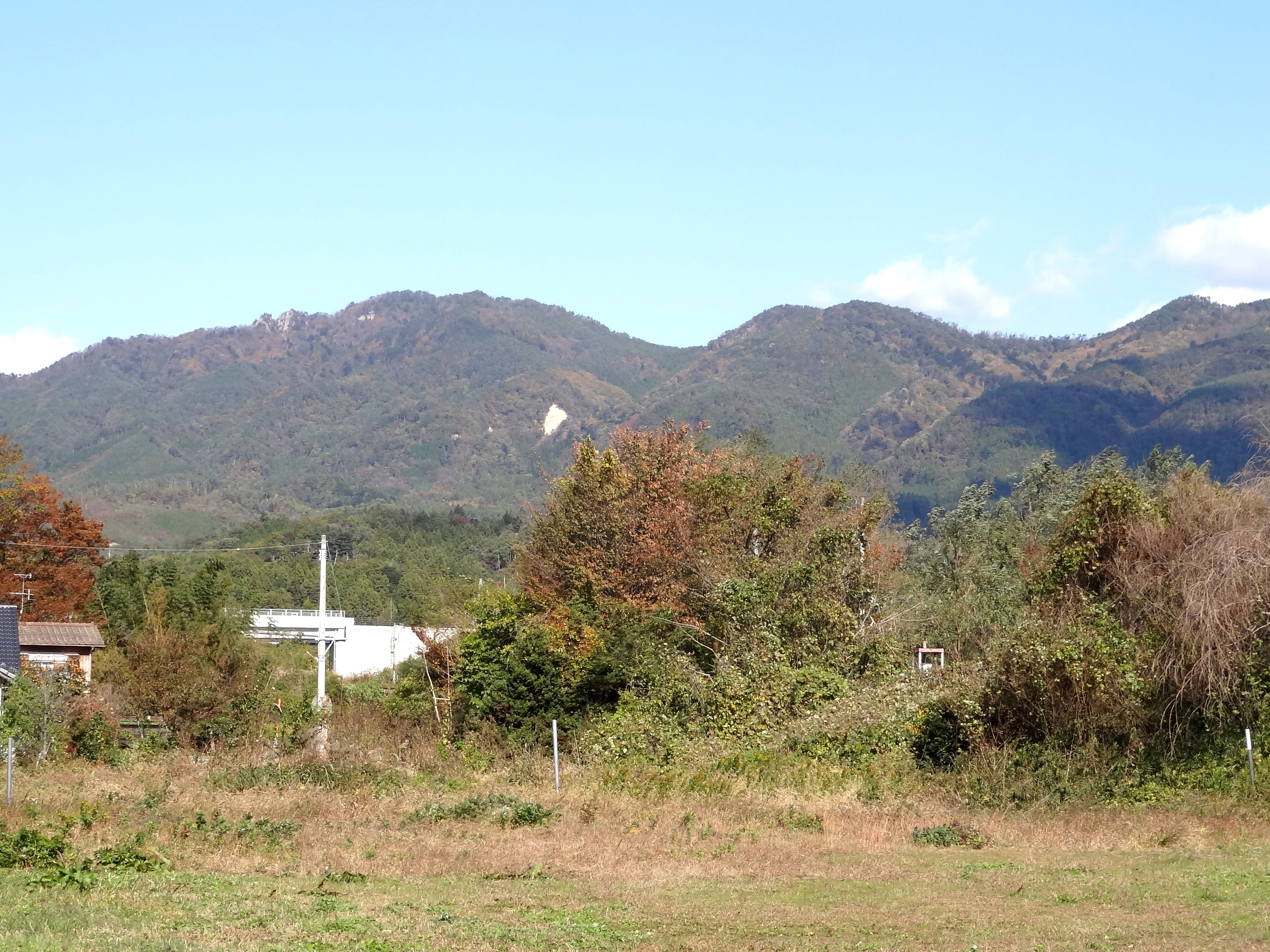 小川郷駅前から見た二ッ箭山